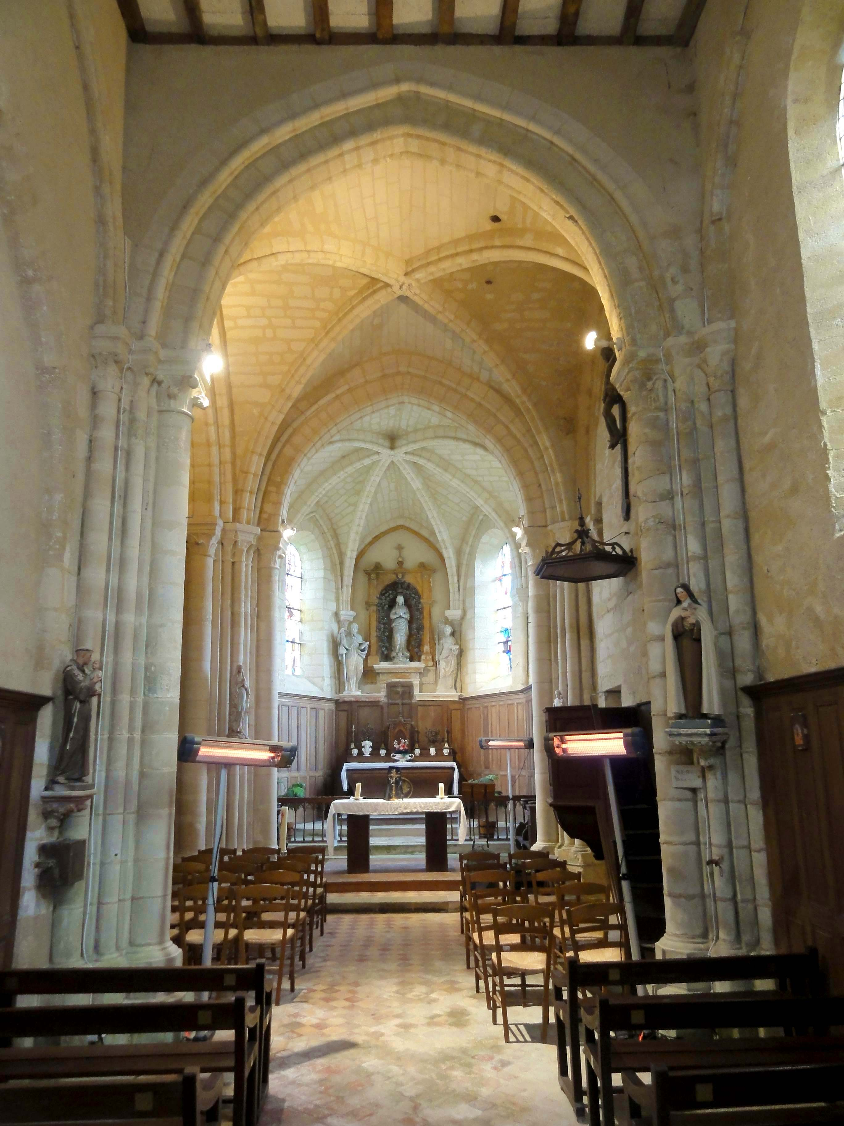 Intérieur de l'église - voir titre.